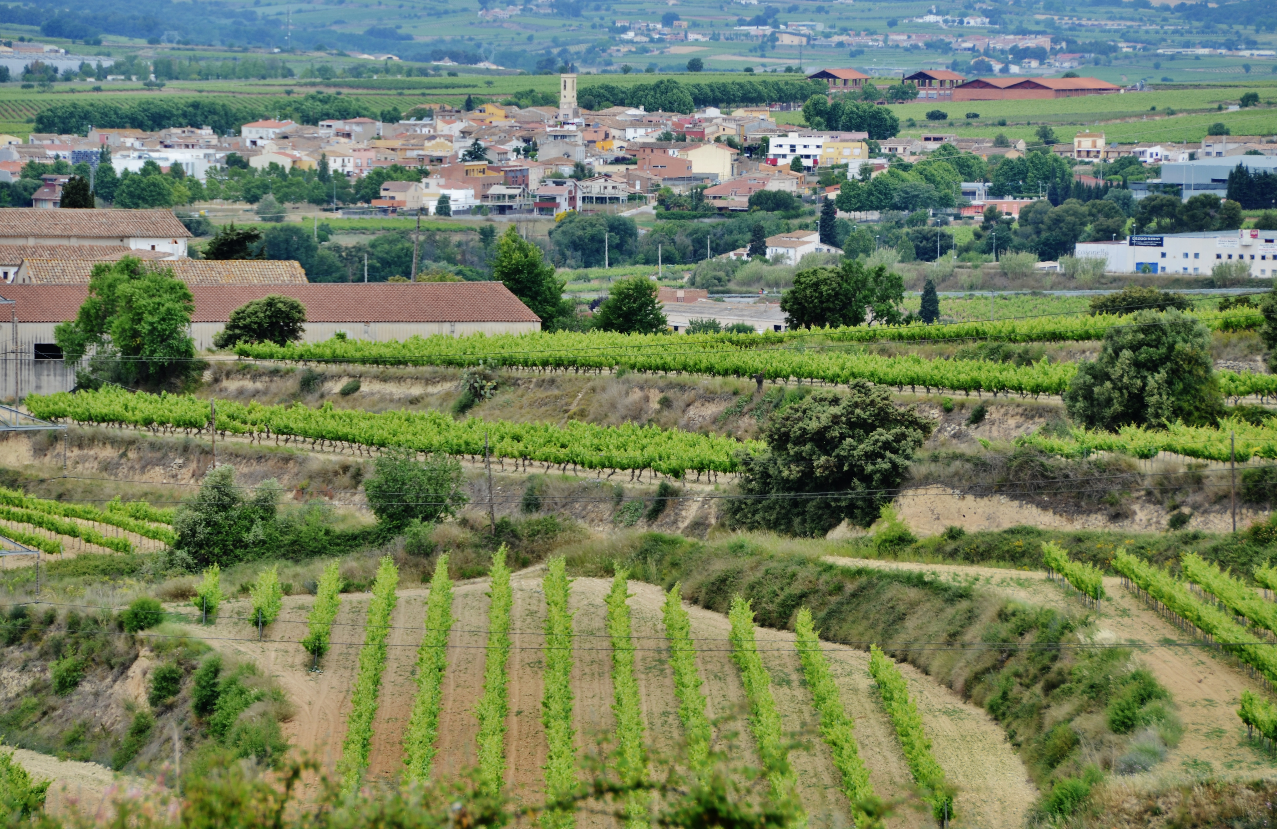 Olèrdola, Alt Penedès